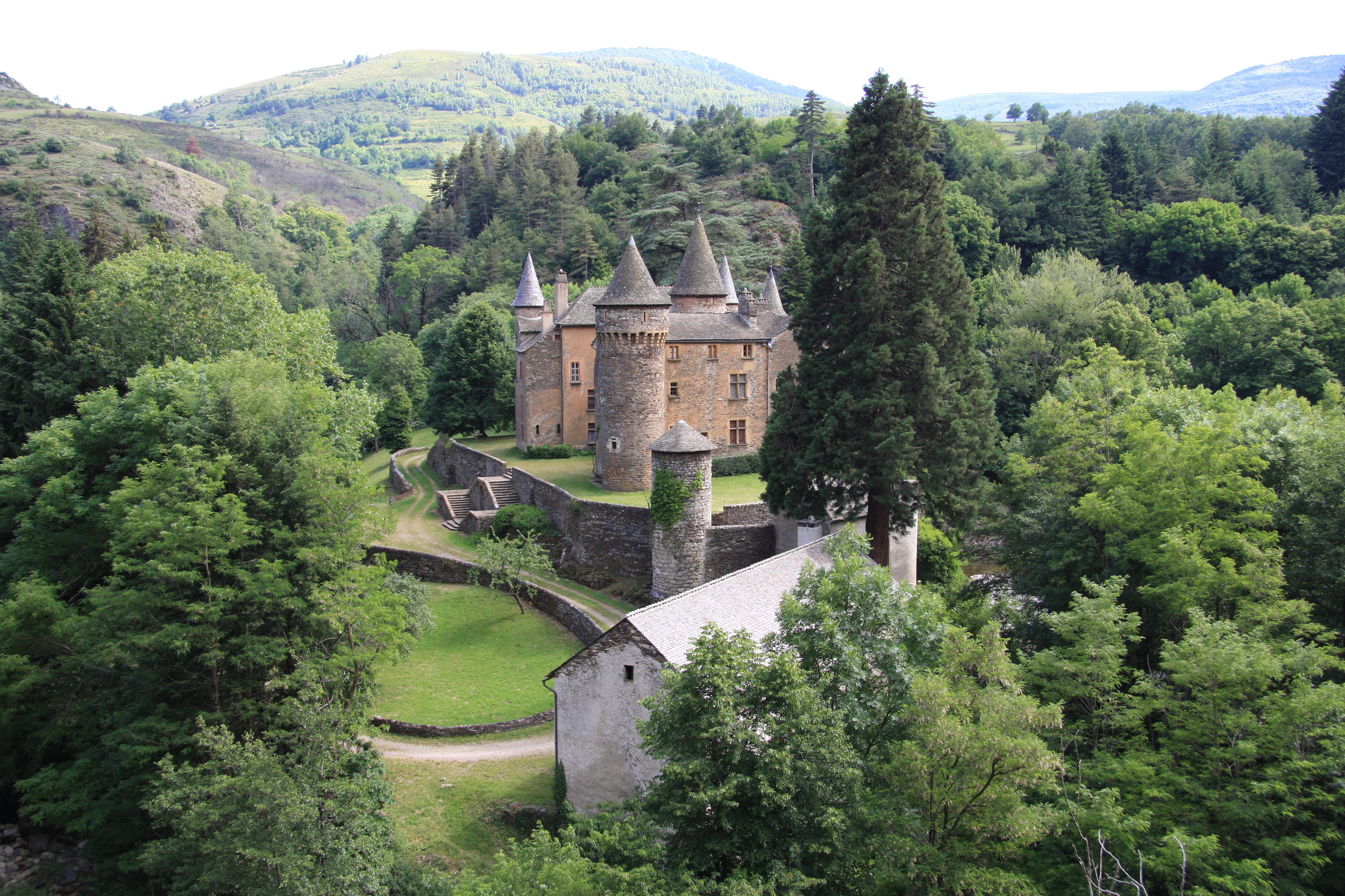 Le château du Champ à Altier en Lozère (France)